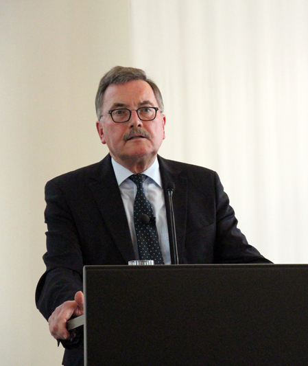 Jürgen Stark (Ökonom), während seiner Rede „Die europäische Währungsunion – zwischen Krise und Reform" bei der Stresemann-Gesellschaft in Mainz